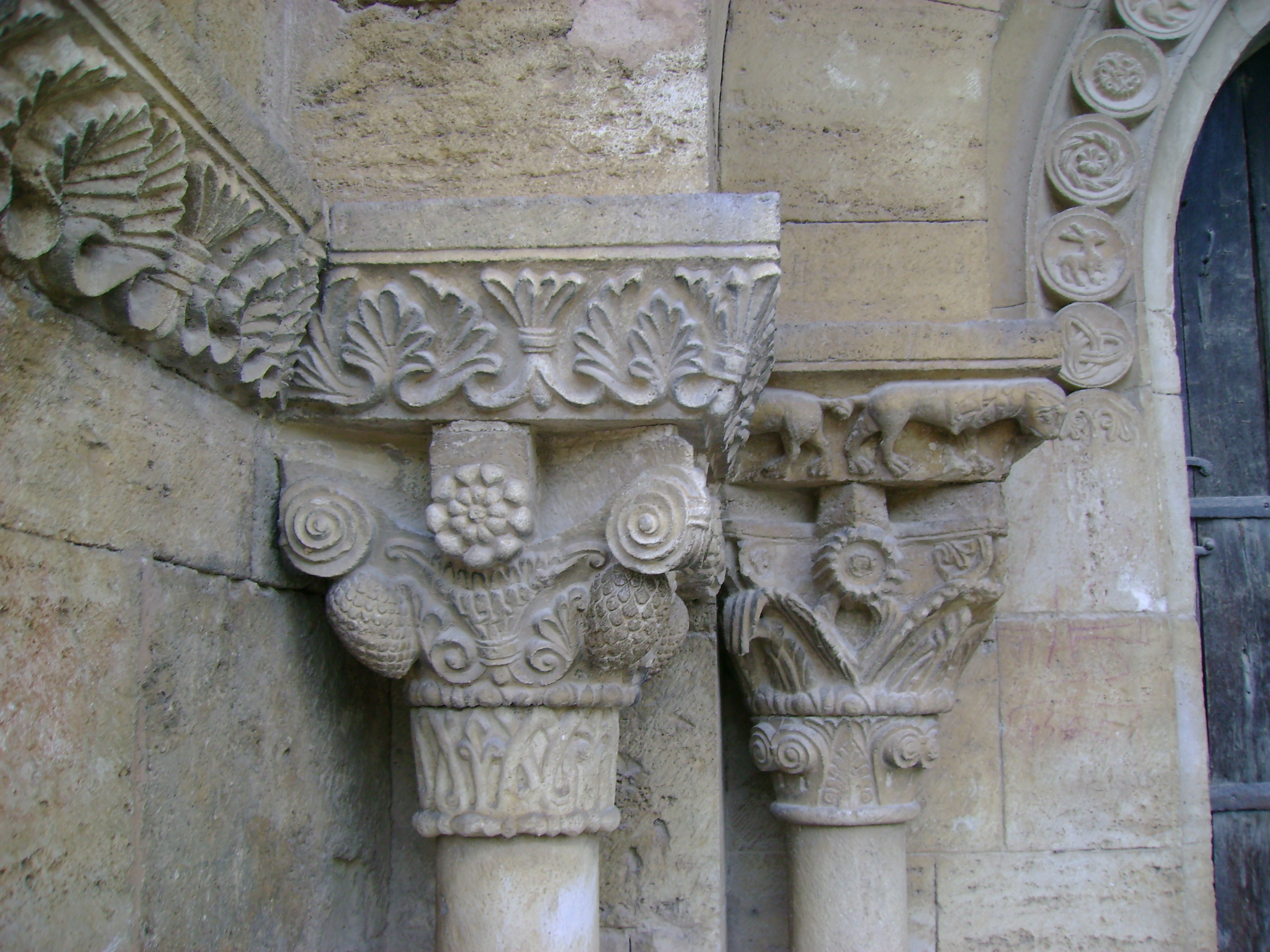 Iglesia de Santa María de Porqueres (Banyoles, Girona). Detalle de los capiteles izquierdos de la portada.